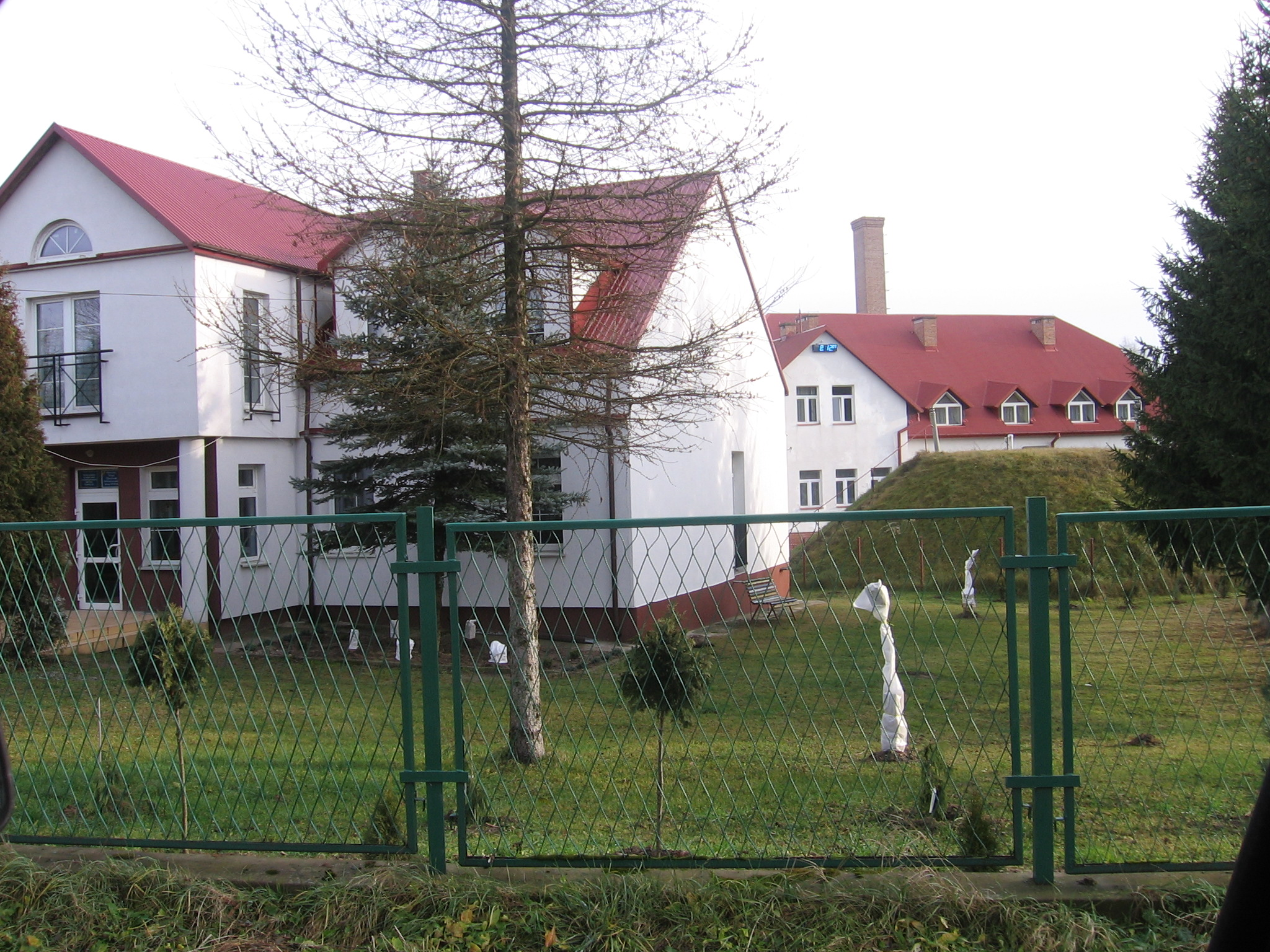 Dom połocy społecznej w Kozarzach